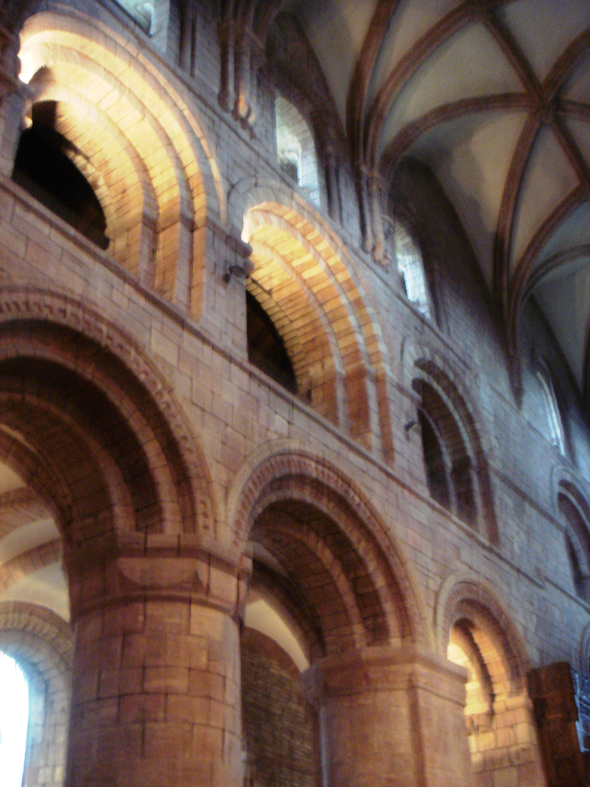 Catedral de San Magnus. Kirkwall (Islas Orcadas, Escocia).